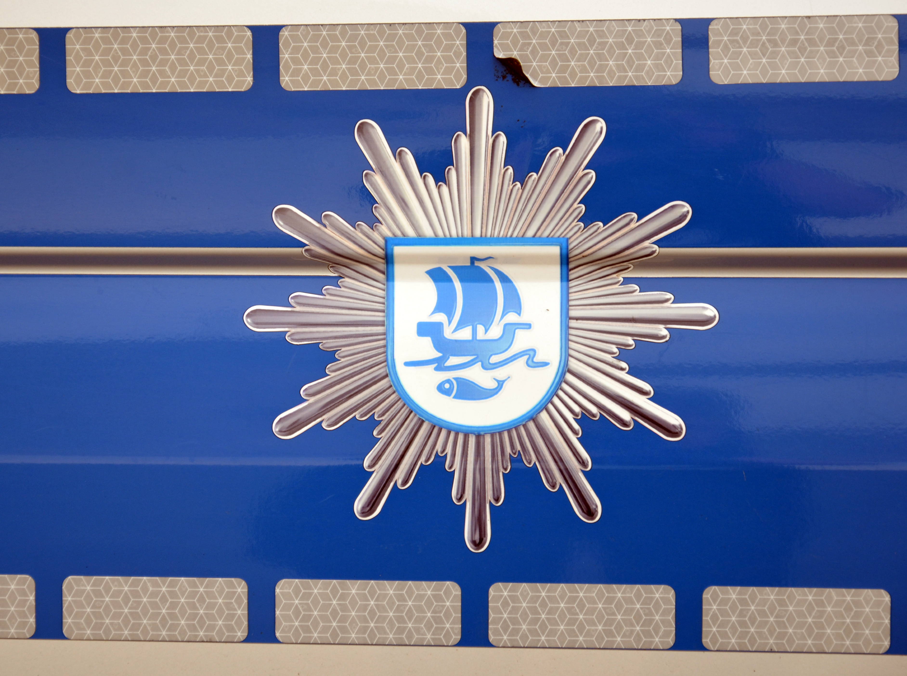 Logo der Ortspolizeibehörde Bremerhaven auf einem Streifenwagen